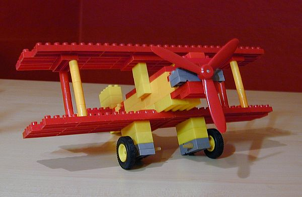 Doppeldeckermodell aus der Rasti-Modellbox 204 (Flugzeuge). Die Farbgebung ist nicht original.